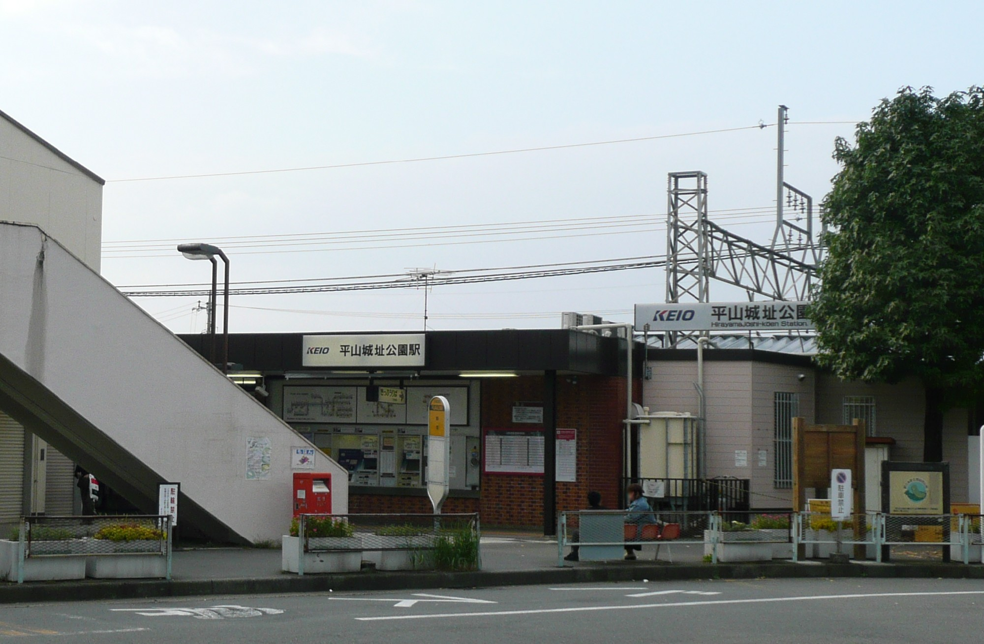 平山城址公園駅